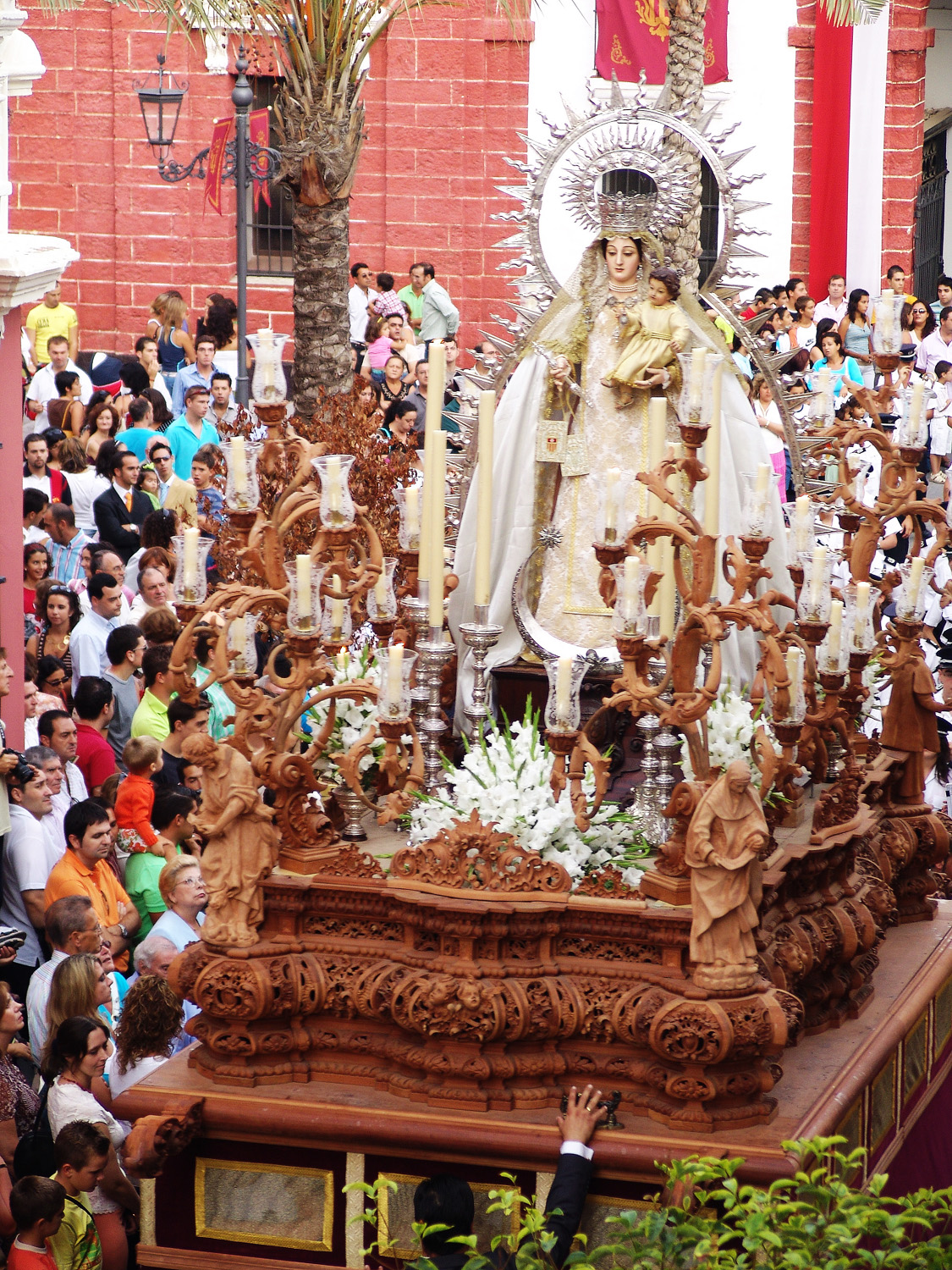 Primera salida procesional de Ntra. Sra. de las Mercedes de San Fernando (Cádiz) ESPAÑA